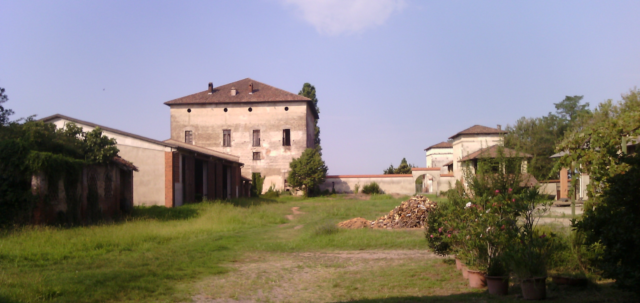 Palazzo Doria Borromeo Medici a Fagnano, Gaggiano (MI)